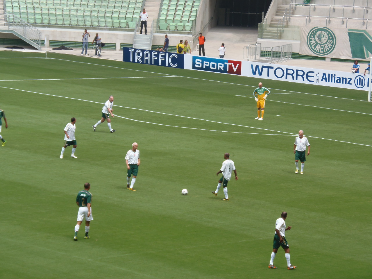 Jogo de homenagem a Ademir da Guia, em evento-teste no Allianz Parque